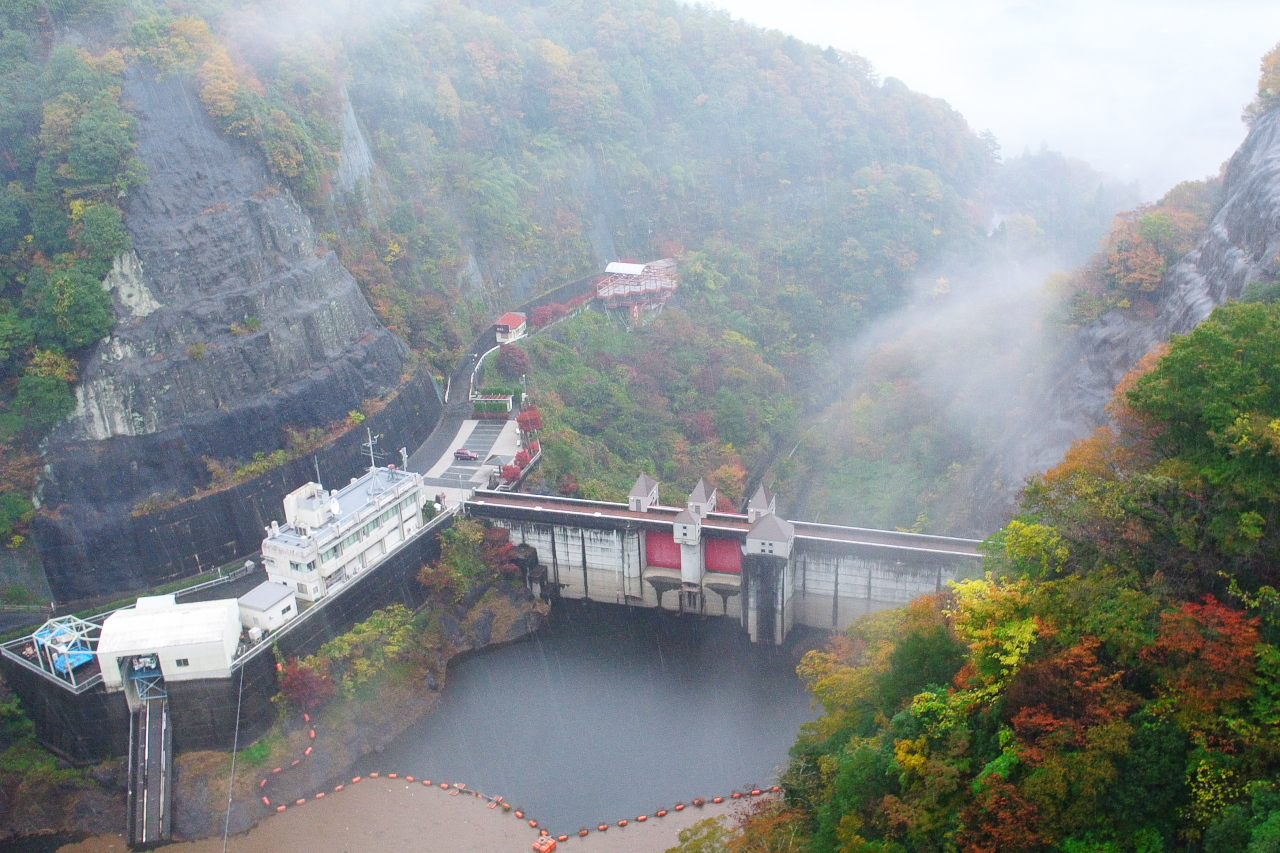 竜神大吊橋から望む竜神ダム。